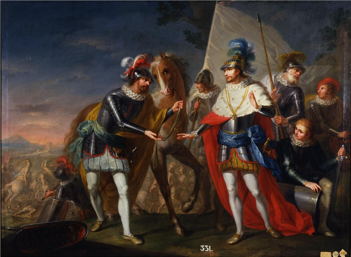 La obra representa al rey Juan I de Castilla (1358-1390), recibiendo un caballo de manos de Pedro González de Mendoza durante la batalla de Aljubarrota, librada en 1385, para que el monarca castellano pudiera escapar del campo de batalla, en la que el ejército castellano fue completamente derrotado.